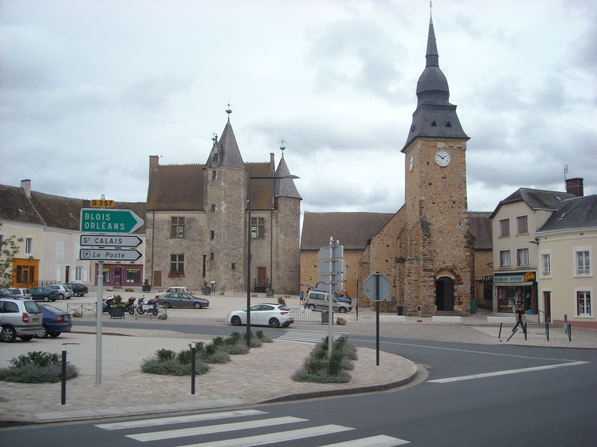 Photo de la place du château.